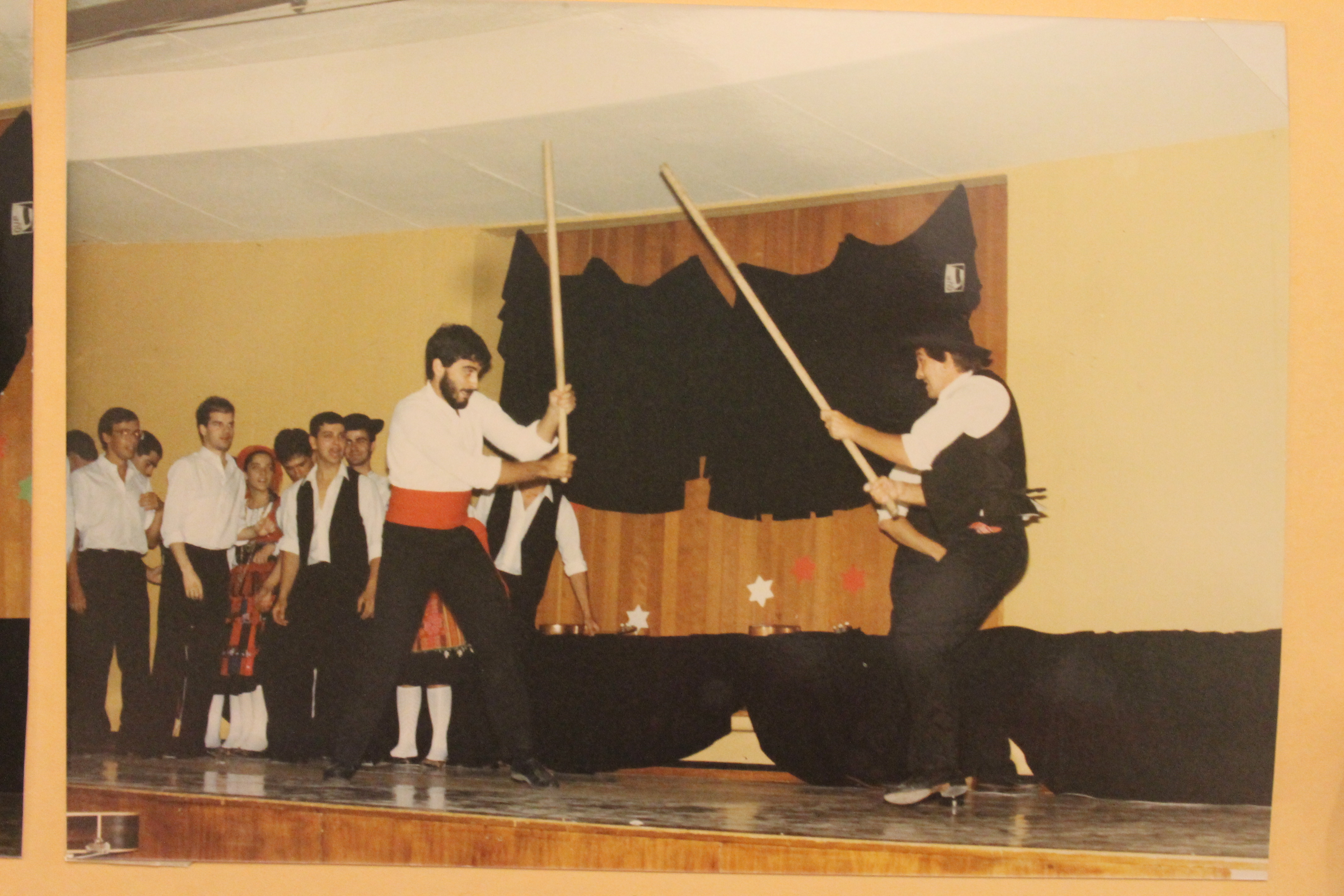 OUP e Sion na Digressão de 87 à Suíça, Alemanha e Polónia. Jogo do Pau.